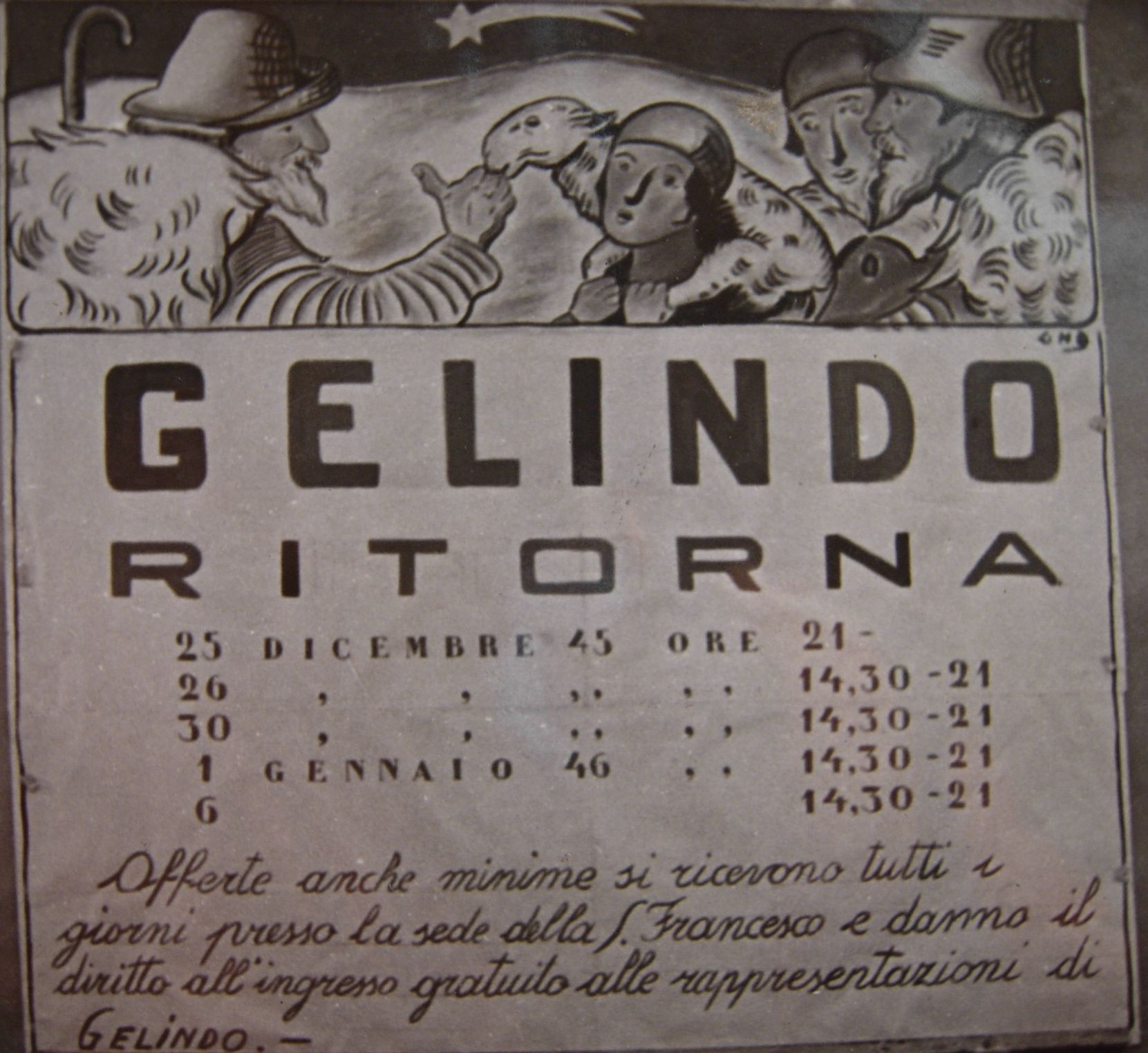 La locandina degli spettacoli di Gelindo del periodo 1945/46